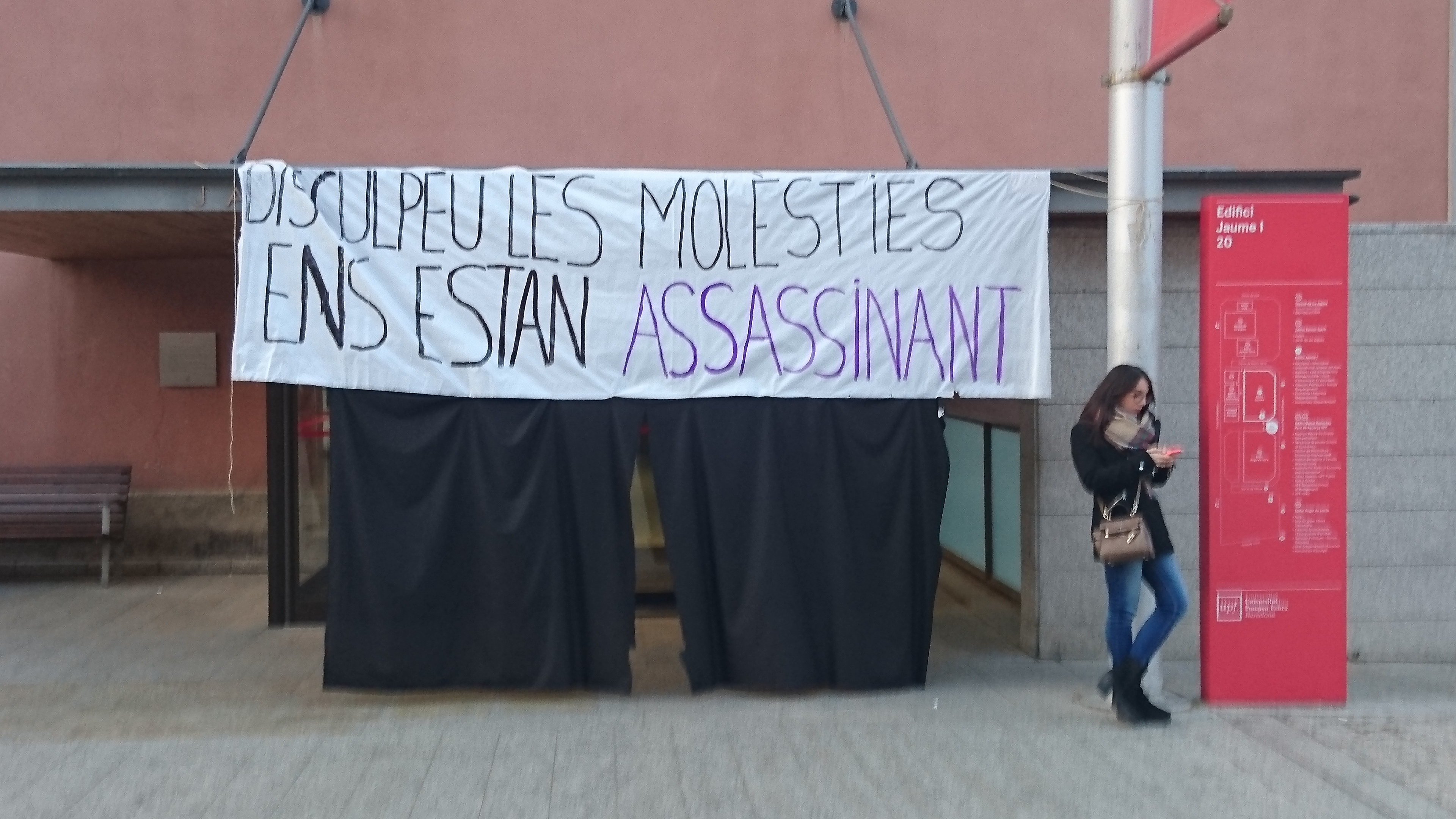 Pancarta al campus de Ciutadella de la Universitat Pompeu Fabra en motiu del 25 de novembre, Dia internacional per a l'eliminació de la violència contra les dones, de 2015.